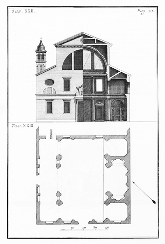 Floor plan and front/section of the Church of Santa Lucia in Venice. From Architettura di Andrea Palladio vicentino by F. Muttoni, 1740-1760.